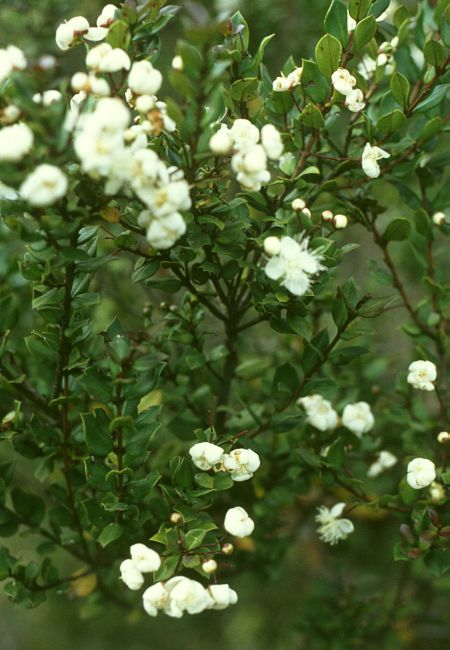 Luma apiculata, Myrtengewächse (Myrtaceae) - Chile, ca. 15 km NE Pargua (Prov. de Llanquihue)